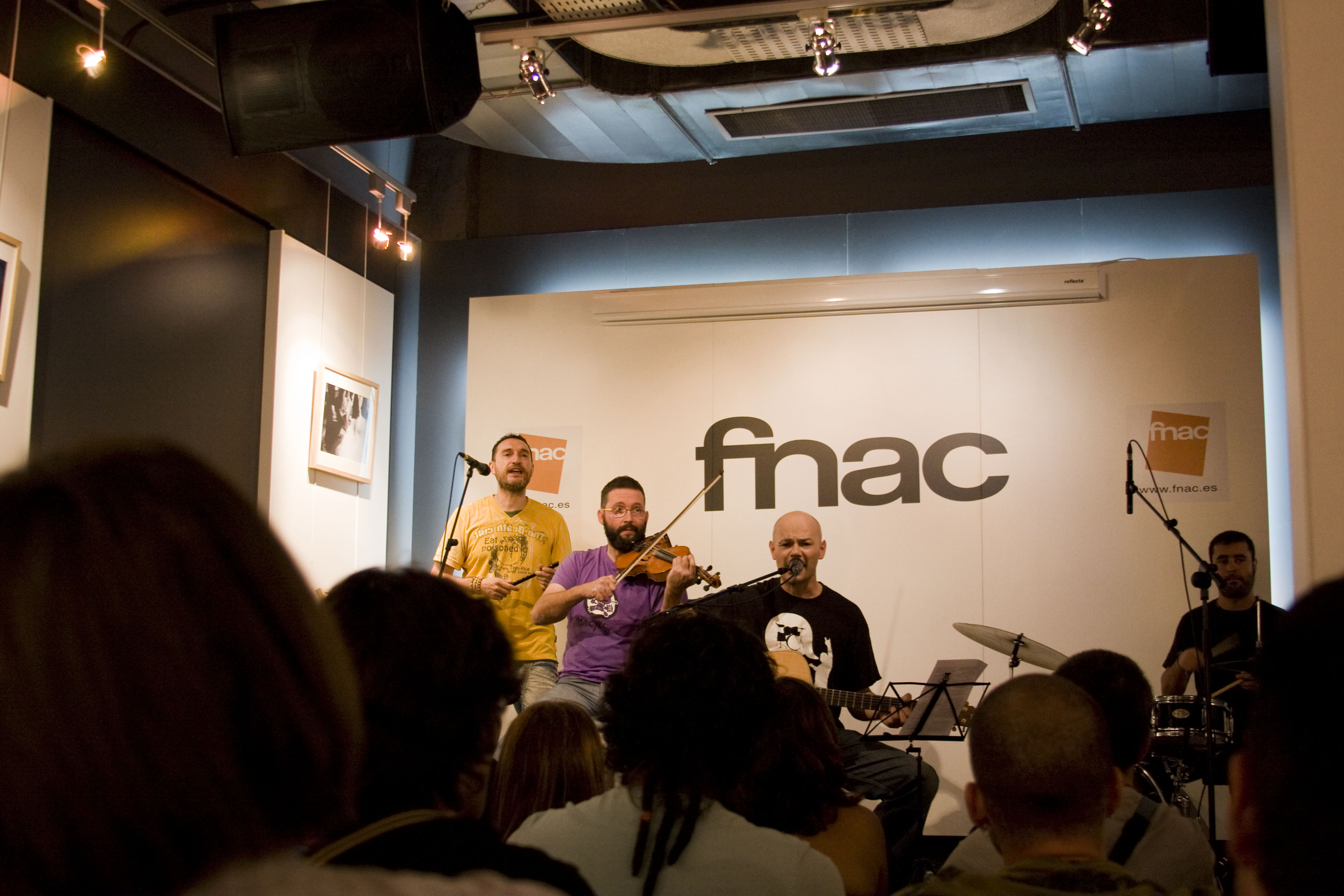 Celtas Cortos en concert à la Fnac de Séville.